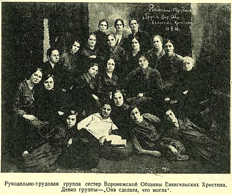 Рукодельно-трудовая группа сестер Воронежской церкви евангельских христиан, 1927 год